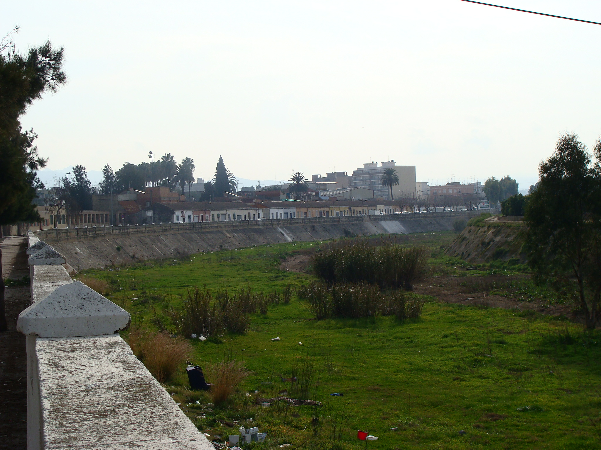 El río Magro a su paso por Algemesí (Valencia, España)